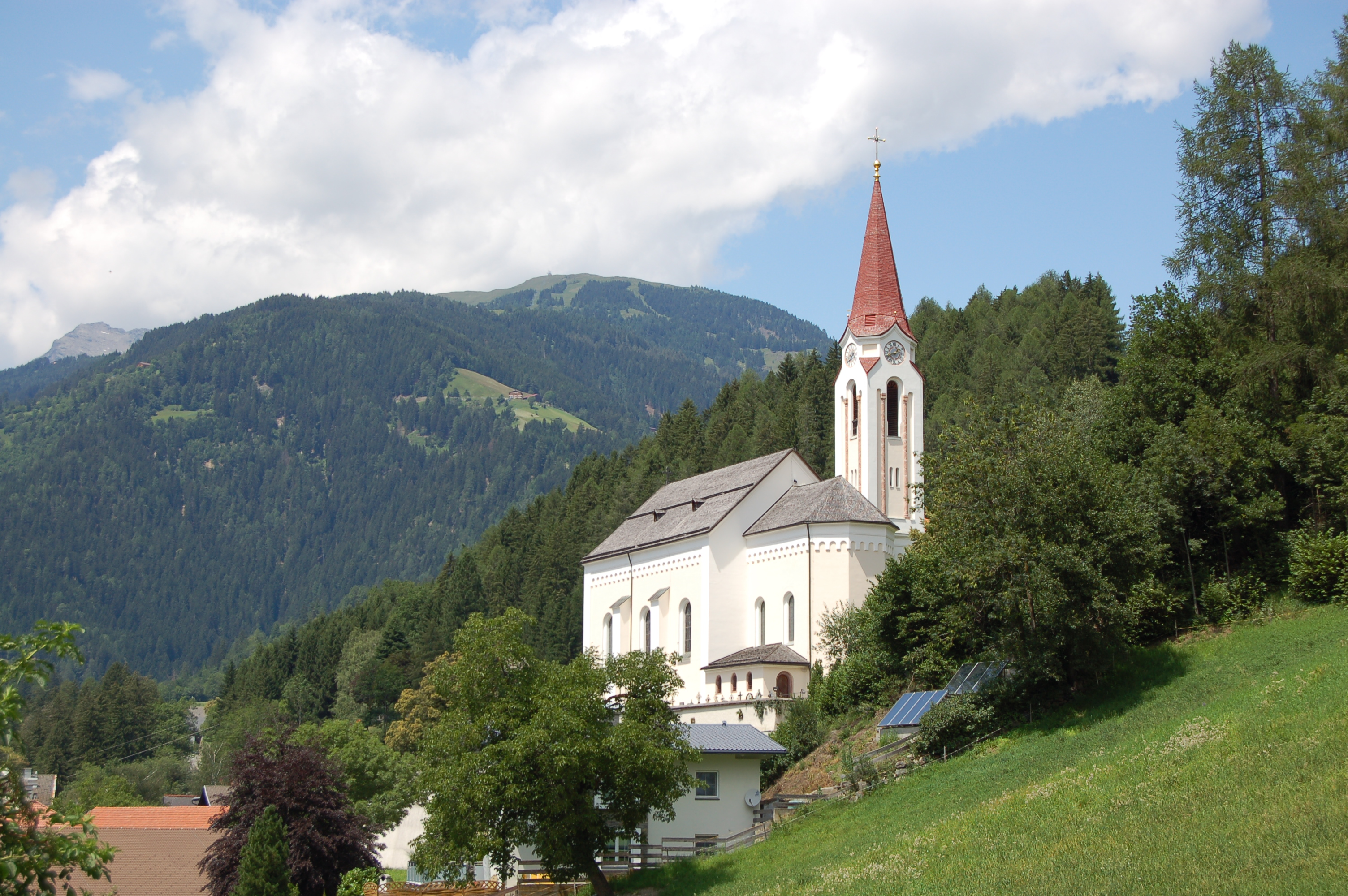 Die denkmalgeschützte Pfarrkirche St. Martin in Dölsach im Bezirk Lienz.